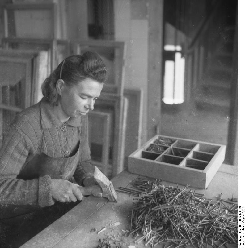 Wiederverwendung alter Nägel Materialersparnis Alte Nägel werden wieder gerade gebogen Auf. Illus-Heinscher Aug. 46 282-46